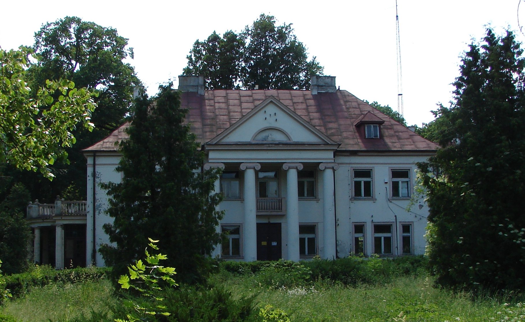 Leszno, zespół pałacowy, XIX/XX